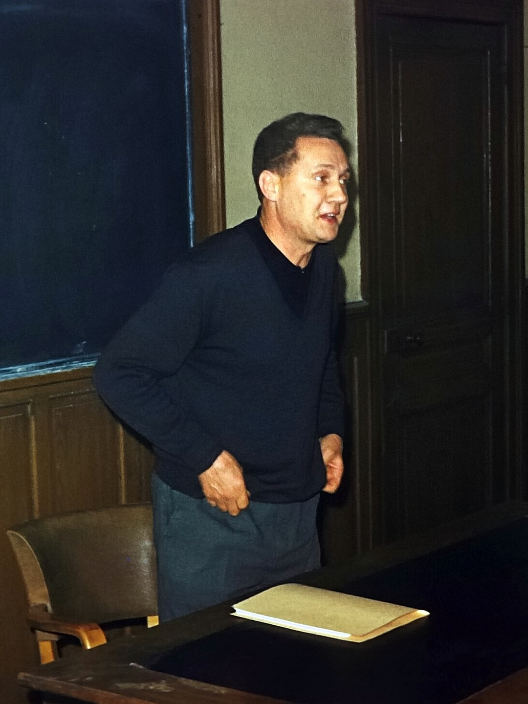 Pierre Halet, 1967, Faculté des Lettres, Bordeaux